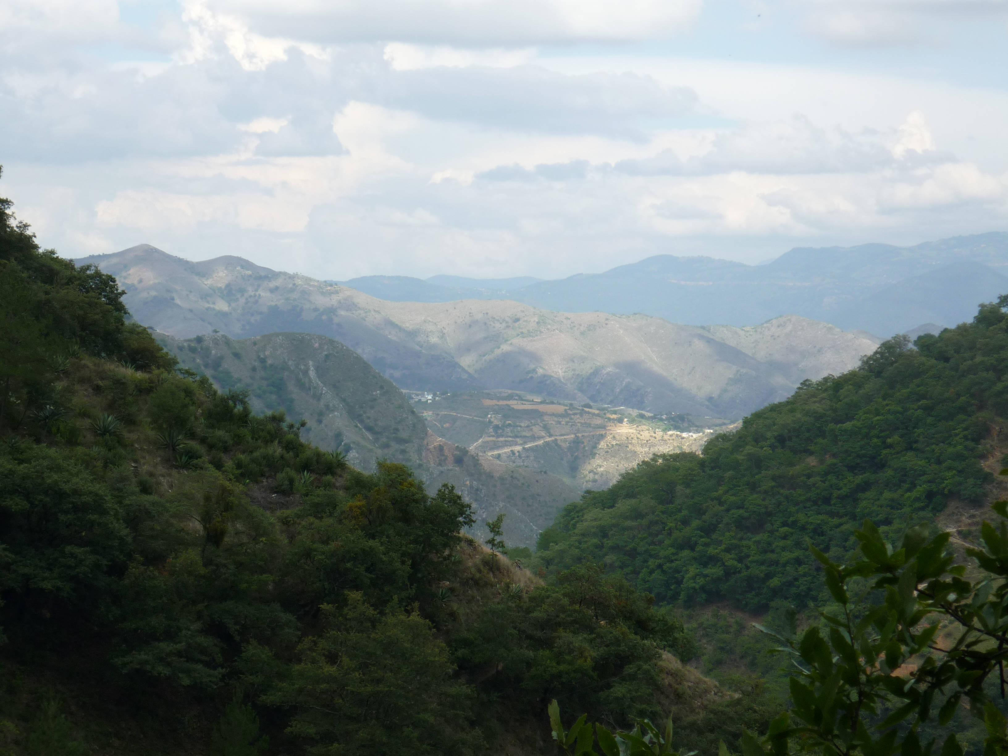 Las Maravillas, comunidad de San Joaquín, municipio en la Sierra Gorda, Querétaro.